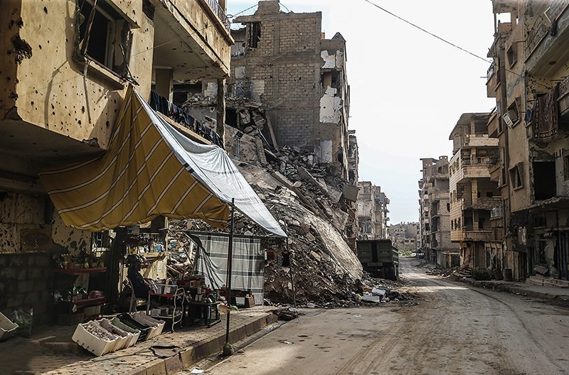 شهر دیرالزور سوریه